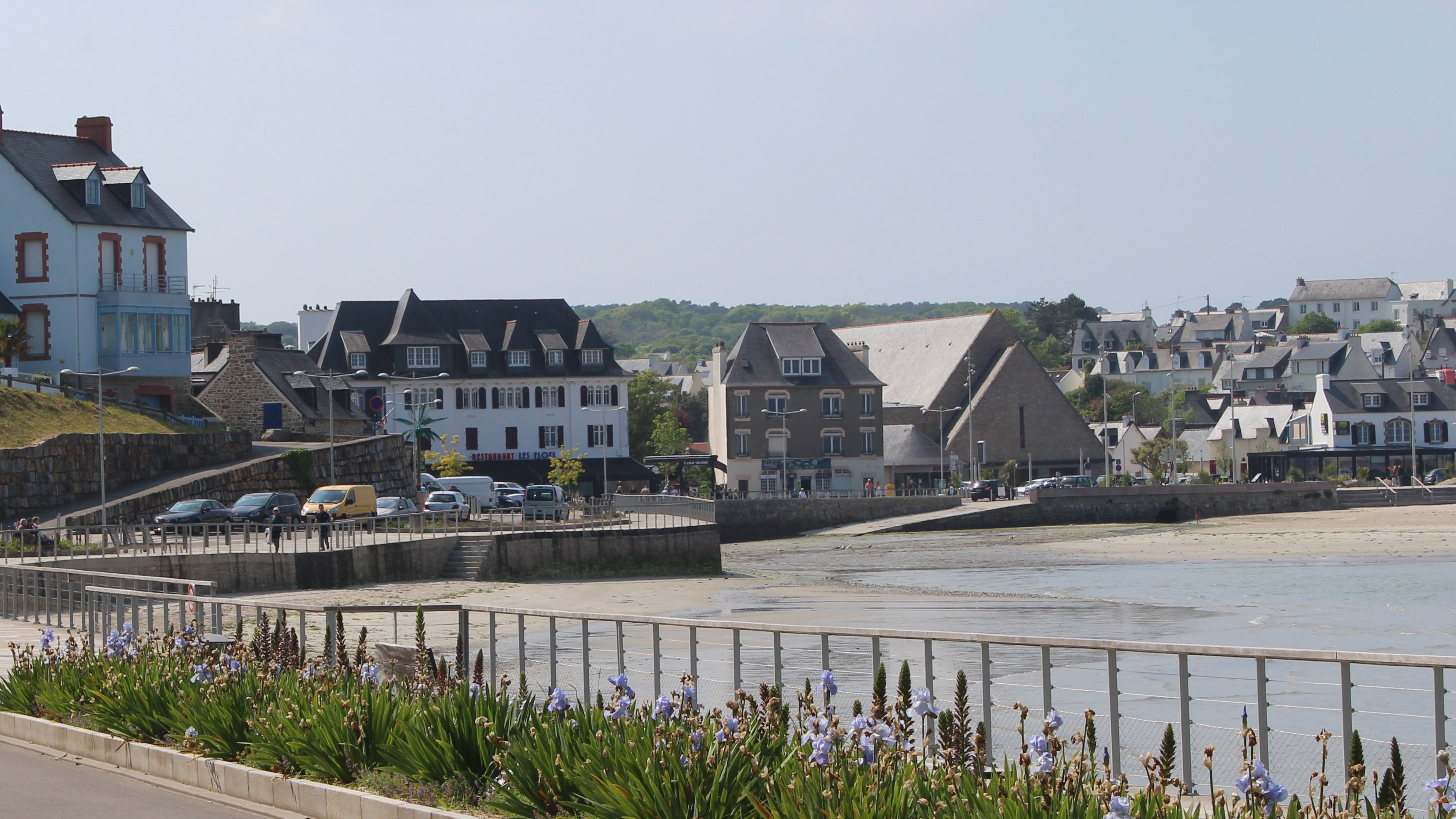 Restaurant et chapelle vus de la plage de Morgat